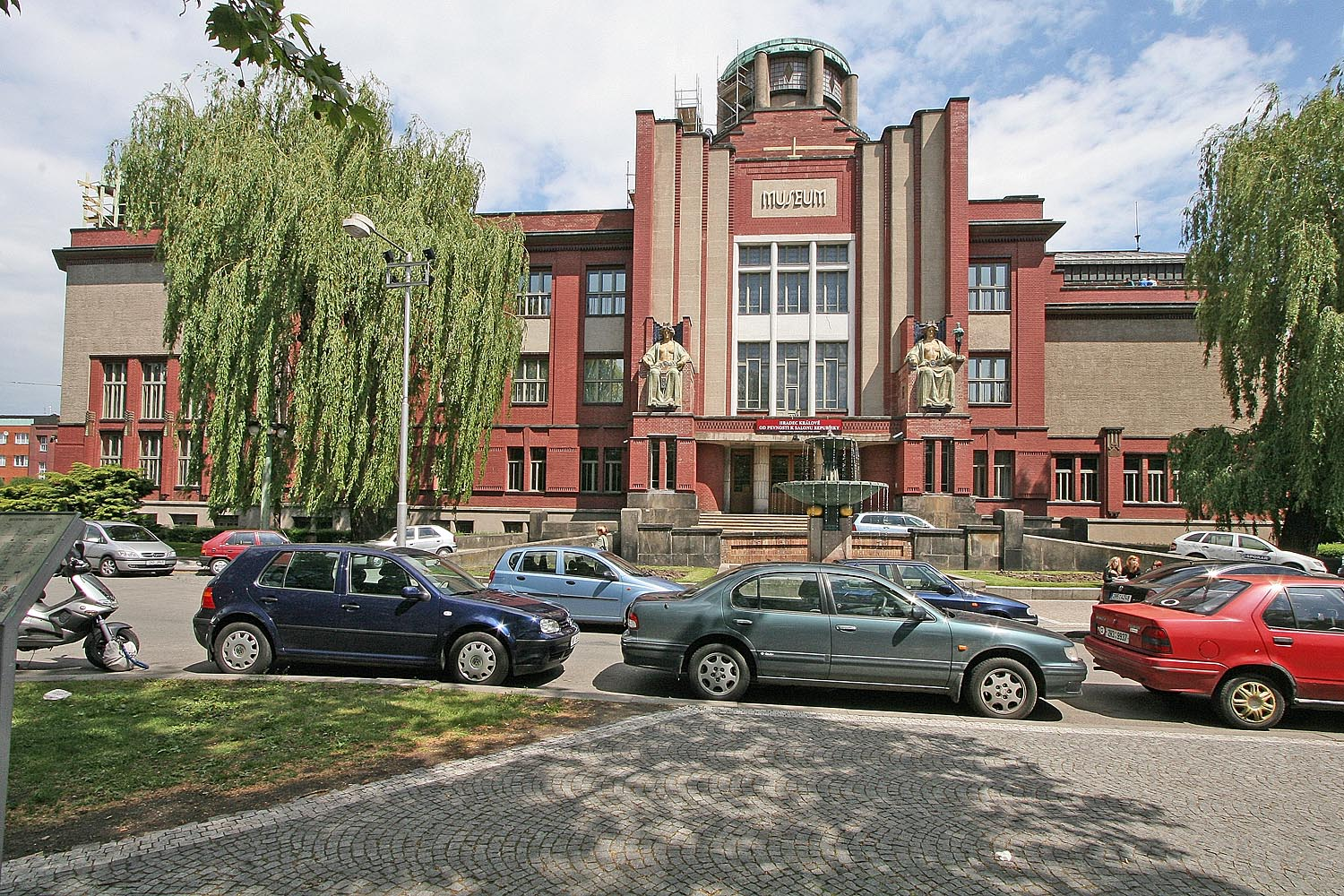 Hradec Králové - Muzeum Východních Čech